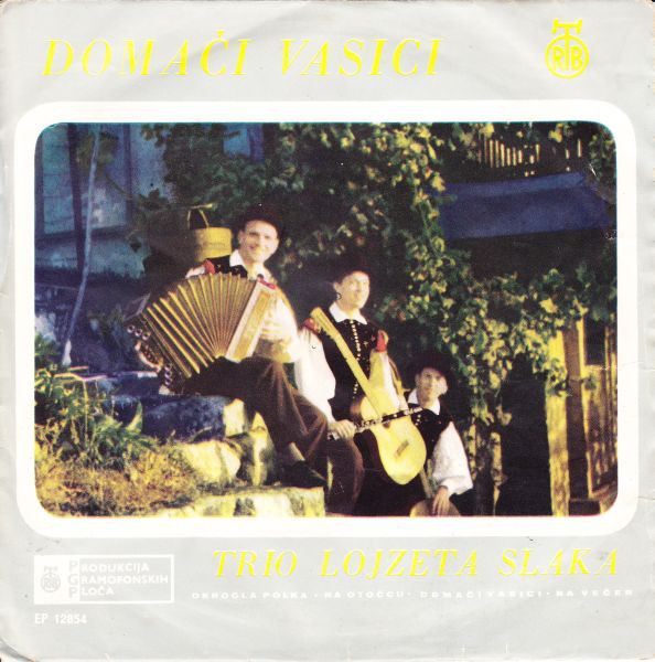 Ansambel Lojzeta Slaka - Domači vasici.